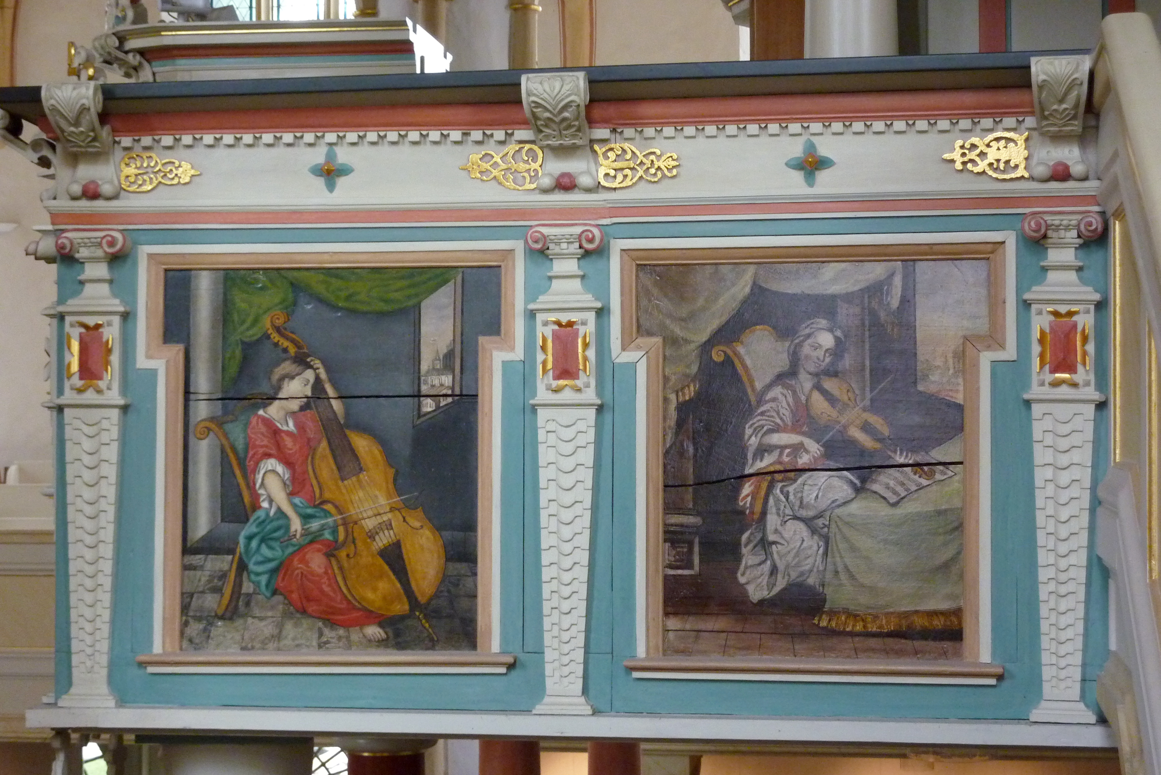 Evangelische Marktkirche St. Dionys in Eschwege im Werra-Meißner-Kreis (Hessen), Emporenbilder